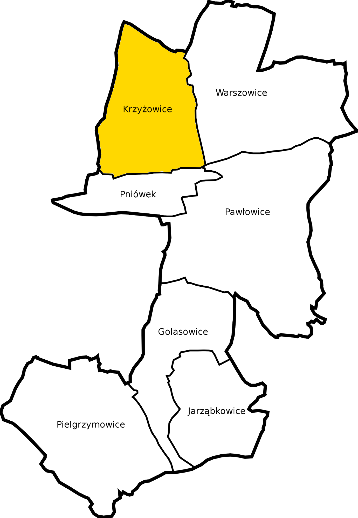 Sołectwo Krzyżowice na mapie gminy Pawłowice